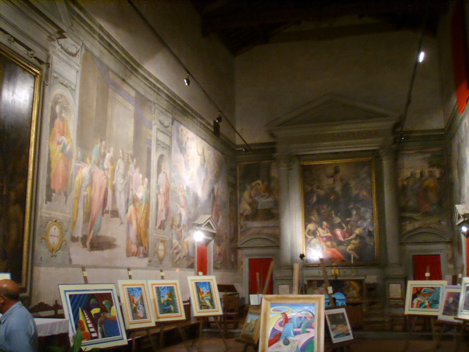 Gesù pellegrino, interno